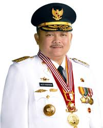 Gubernur Sumatra Selatan Alex Noerdin